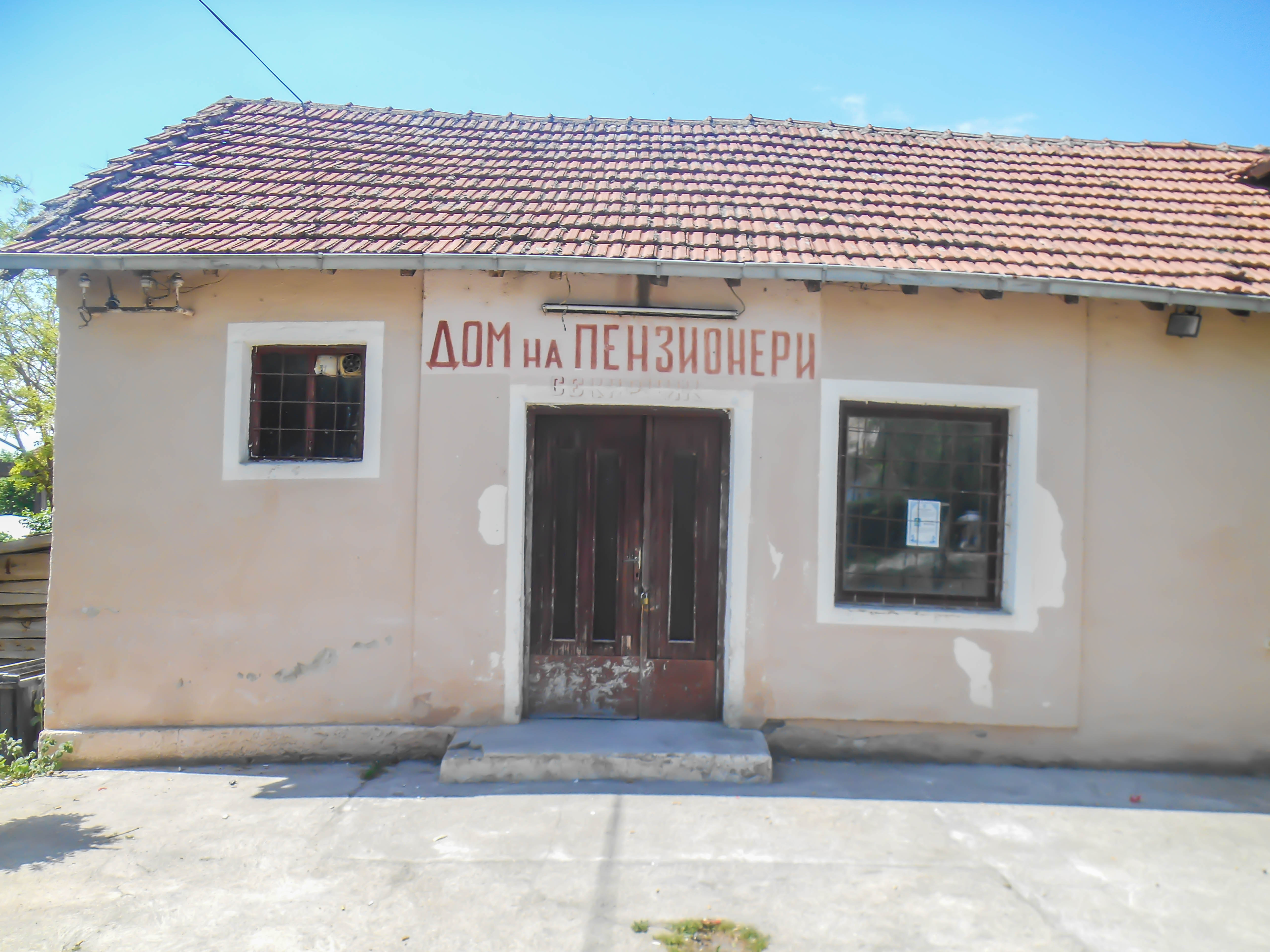 Дом на пензионери - Секирник